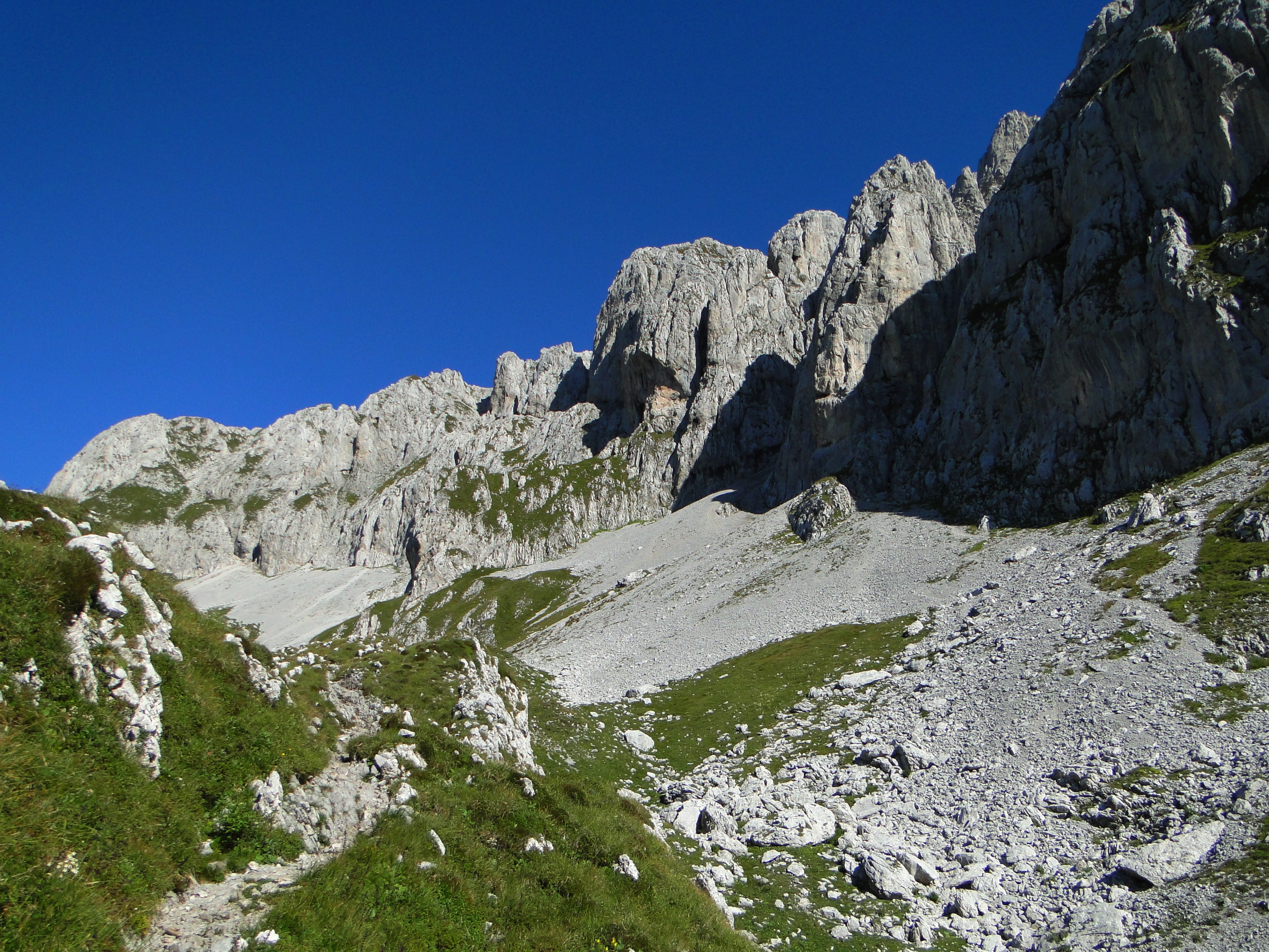 Presolana, parete sud nei pressi della grotta dei Pagani